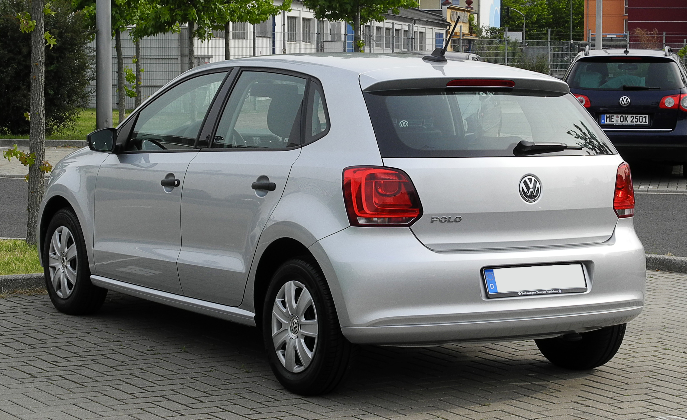 VW Polo Trendline (V)